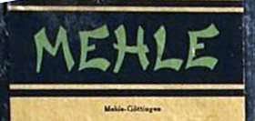 Mehle Aktenordner Emblem, um 1920 (Göttingen)